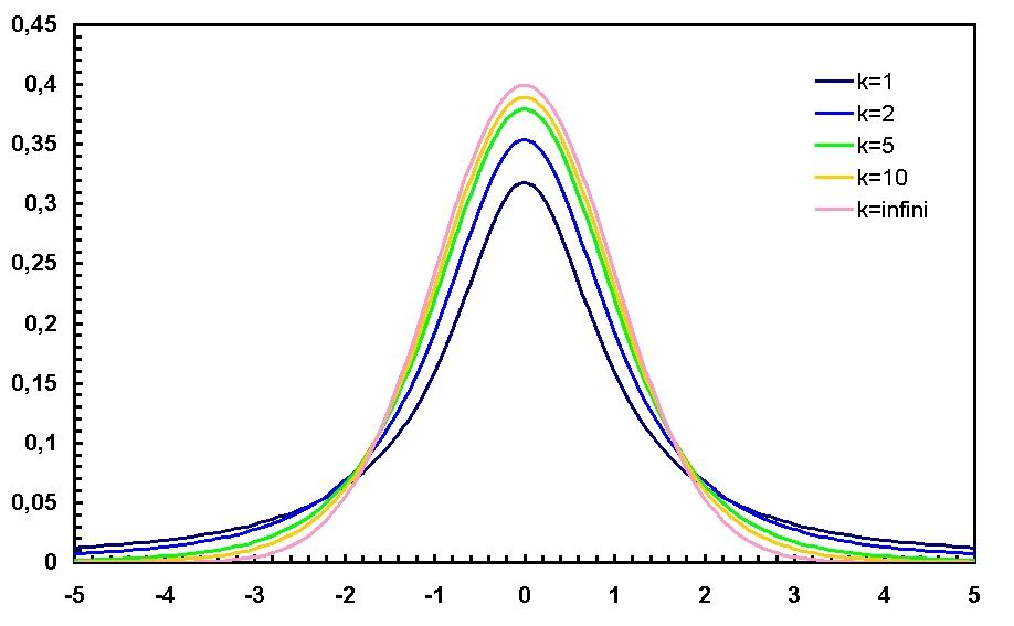 production personelle. Usage et reproduction libre